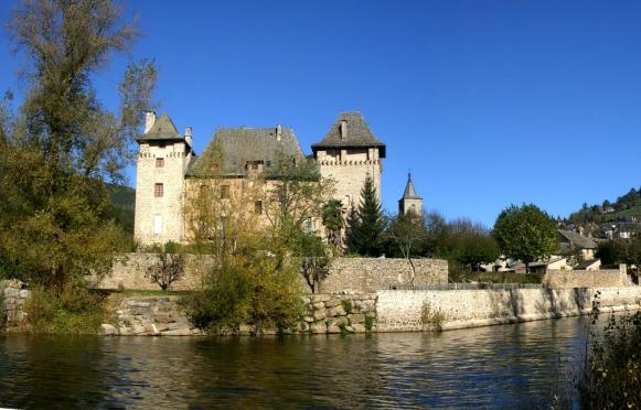 Chateau d'Entraygues-sur-Truyère (12)